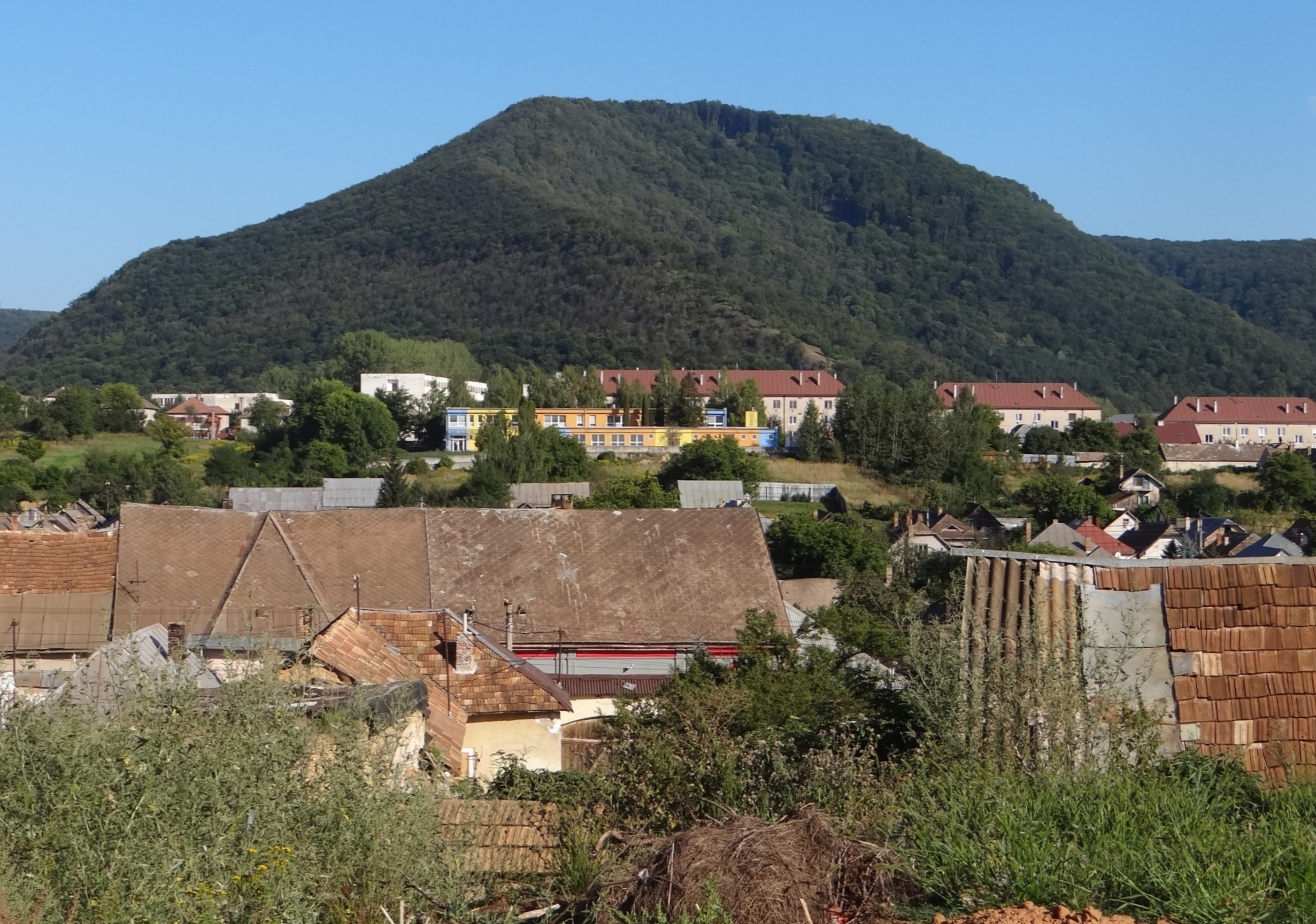 Jelšava